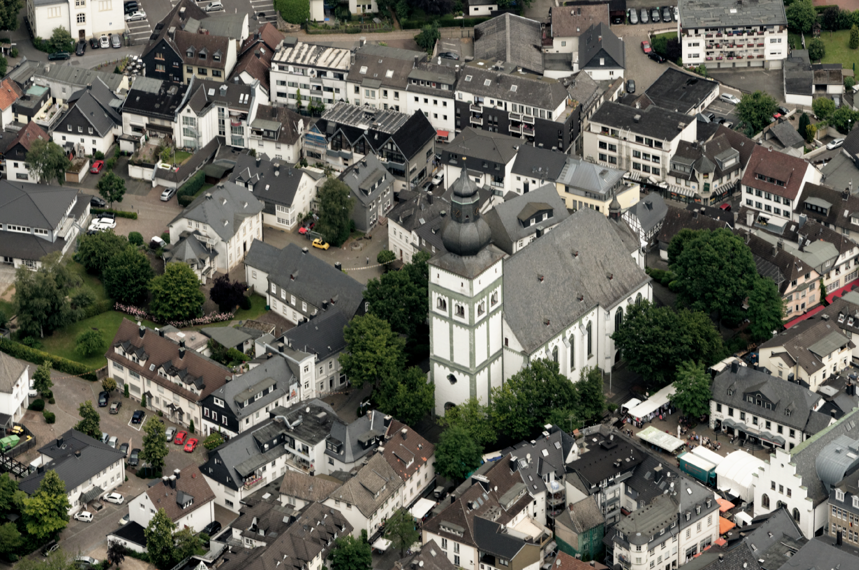 Fotoflug Sauerland Nord. Attendorn, Pfarrkirche St. Johannes Baptist The making of this document was supported by the Community-Budget of Wikimedia Germany.